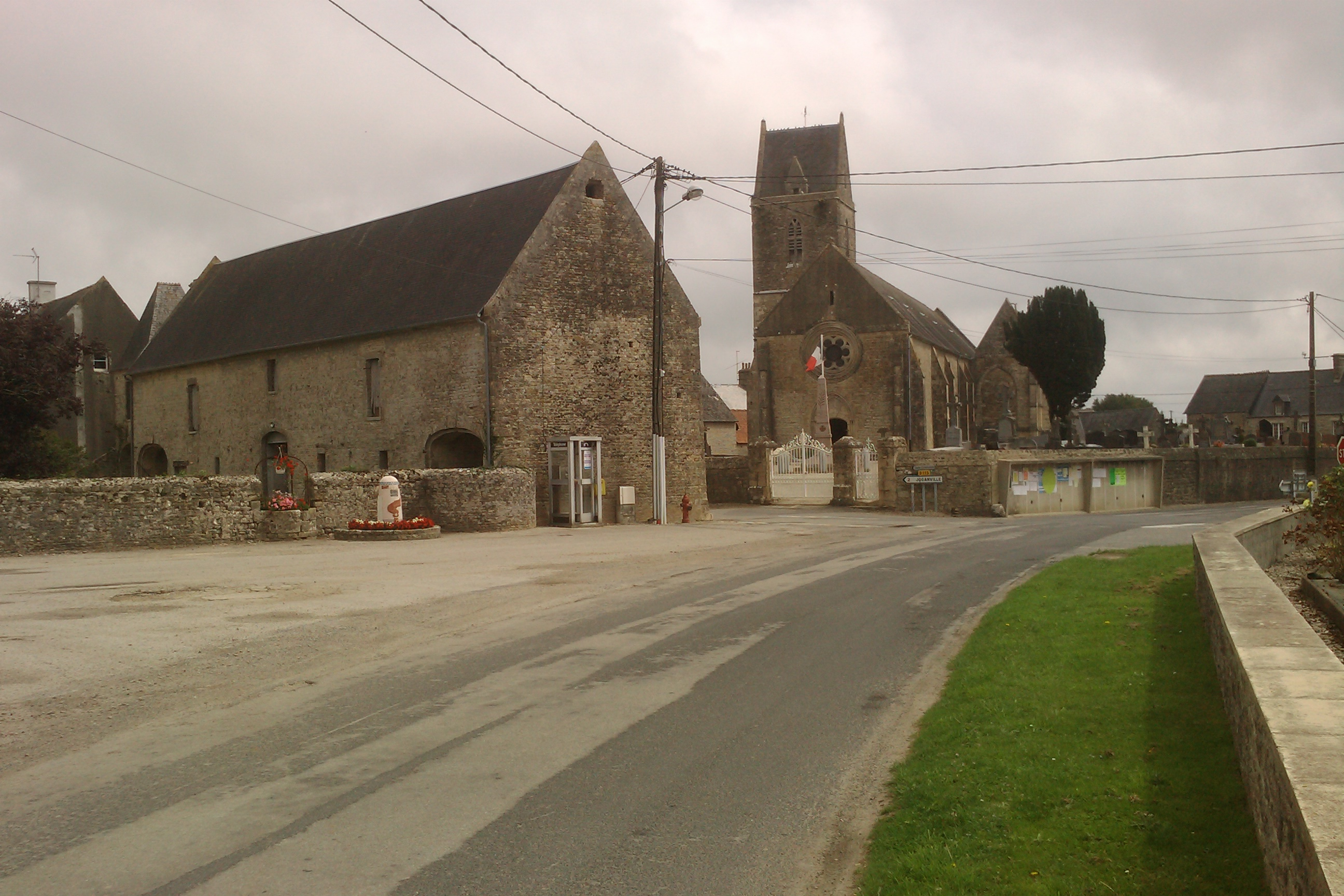 vue du bourg d'Émondeville